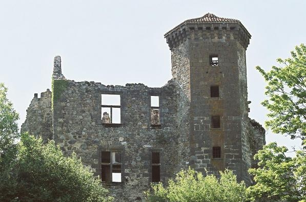 Chateau de Branzac, Pleaux (15)